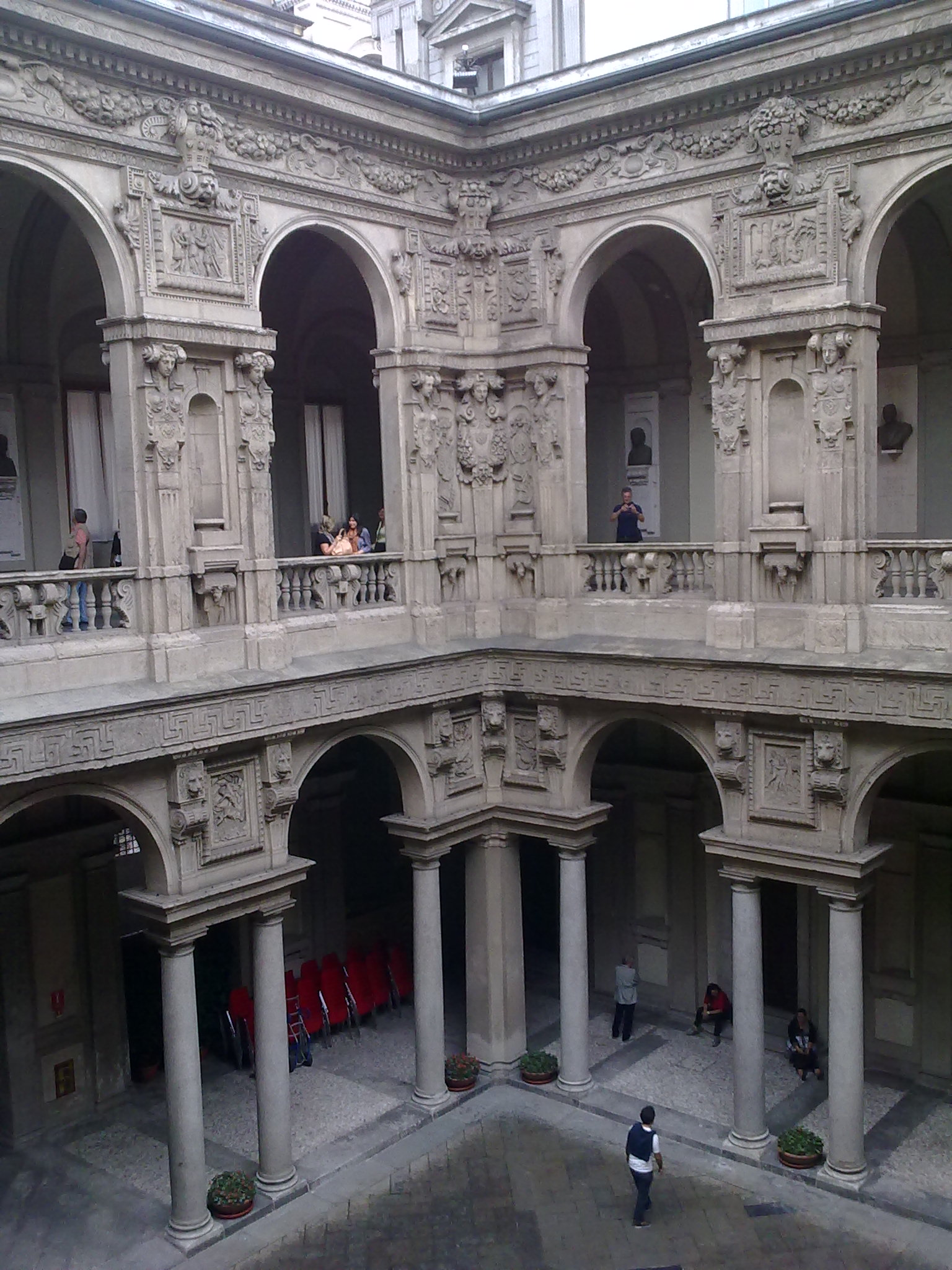 Cortile d'onore di Palazzo Marino a Milano.